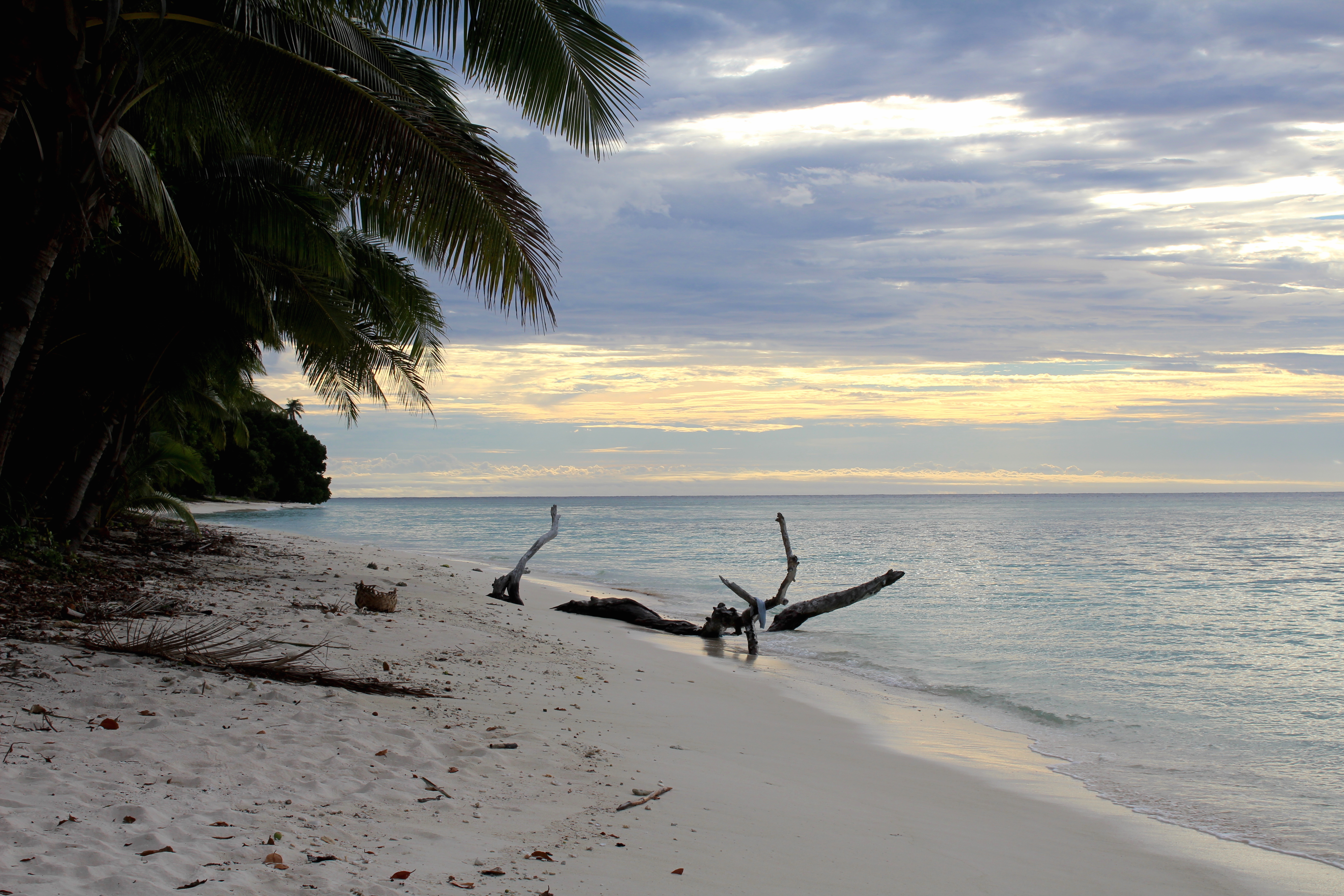 Une fin d'après-midi à Alofi, dont le gardien de l'île est l'unique habitant.